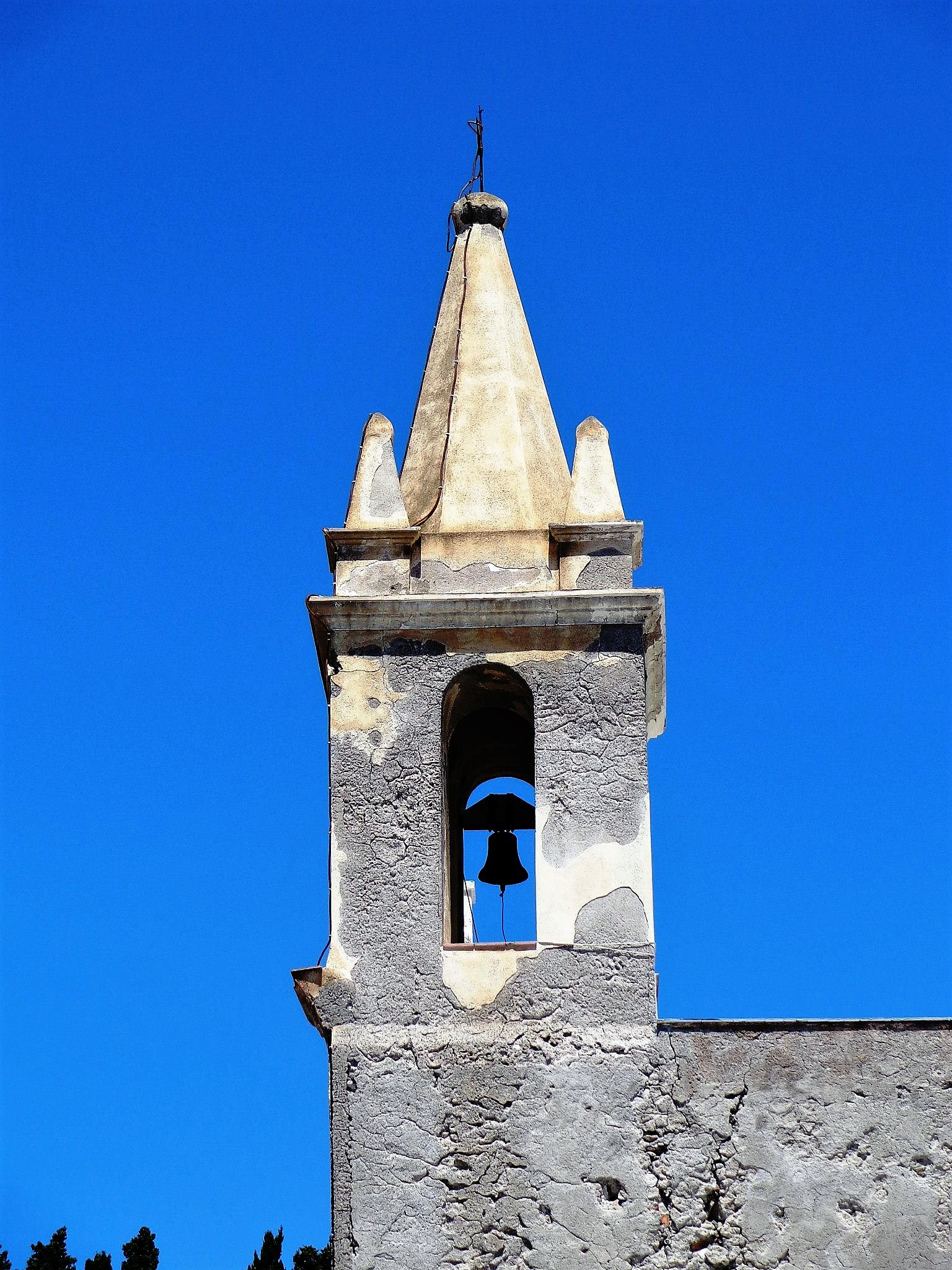 Campanile. Foto presente su pagine web personali e sul profilo FB.